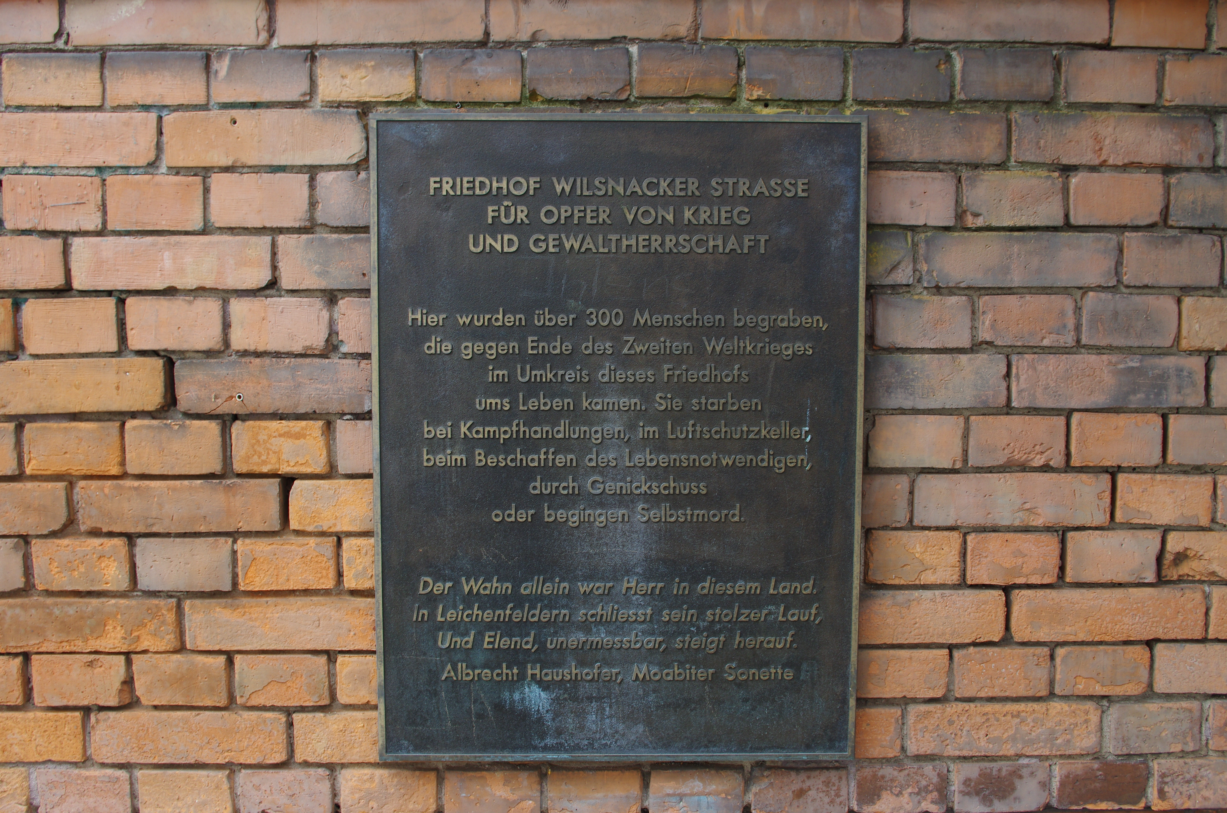 Der Kriegsgräberfriedhof befindet sich in Berlin-Moabit in der Wilsackerstraße. Die Gedenktafel befindet sich rechts vom Eingang außen an der Freidhofsmauer.